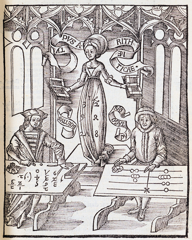 Incisione Typus arithmeticae tratta da Margarita Philosophica (1503)